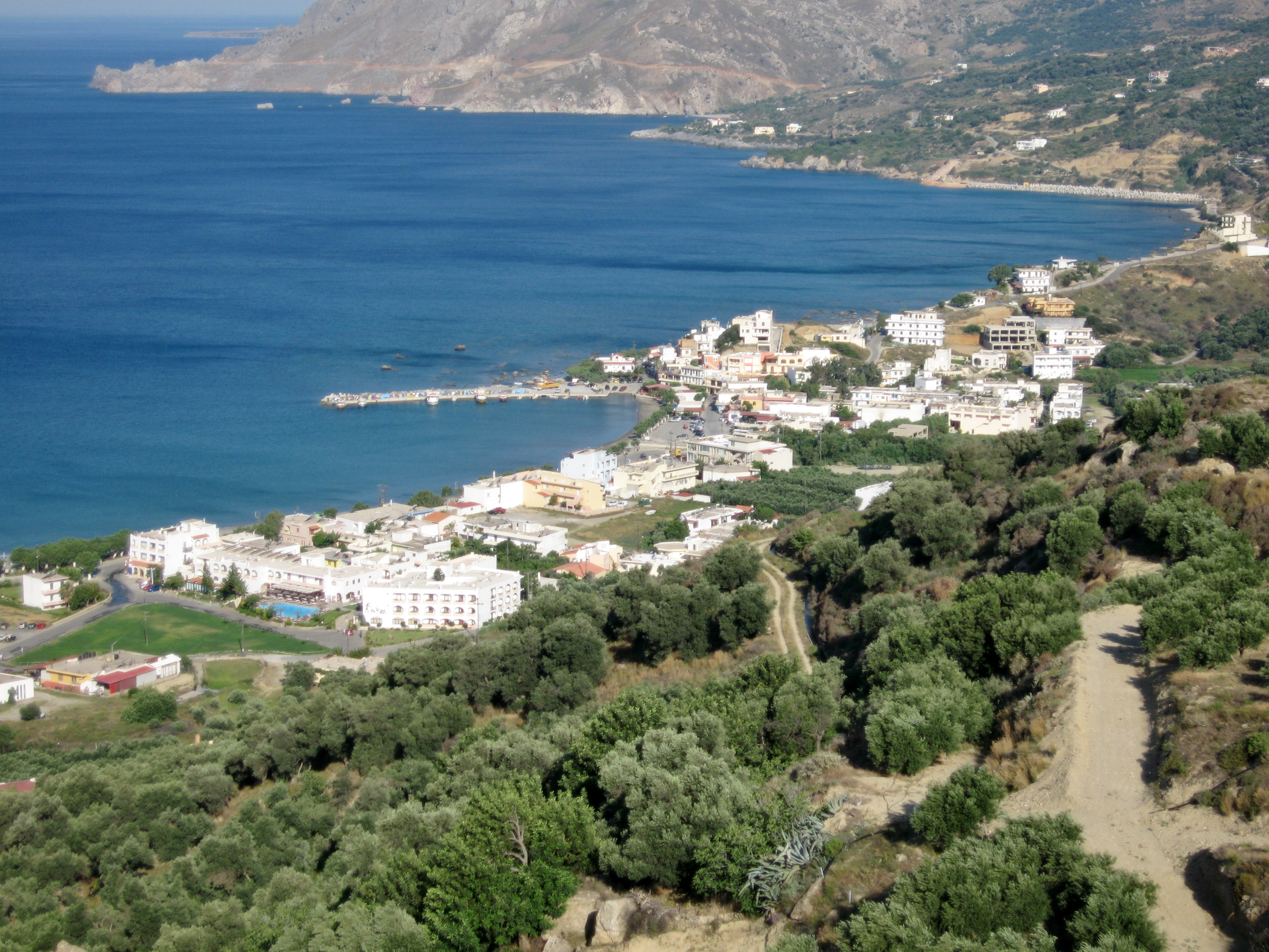 Plakias, Gemeinde Agios Vasilios, Regionalbezirk Rethymno, Kreta, Griechenland